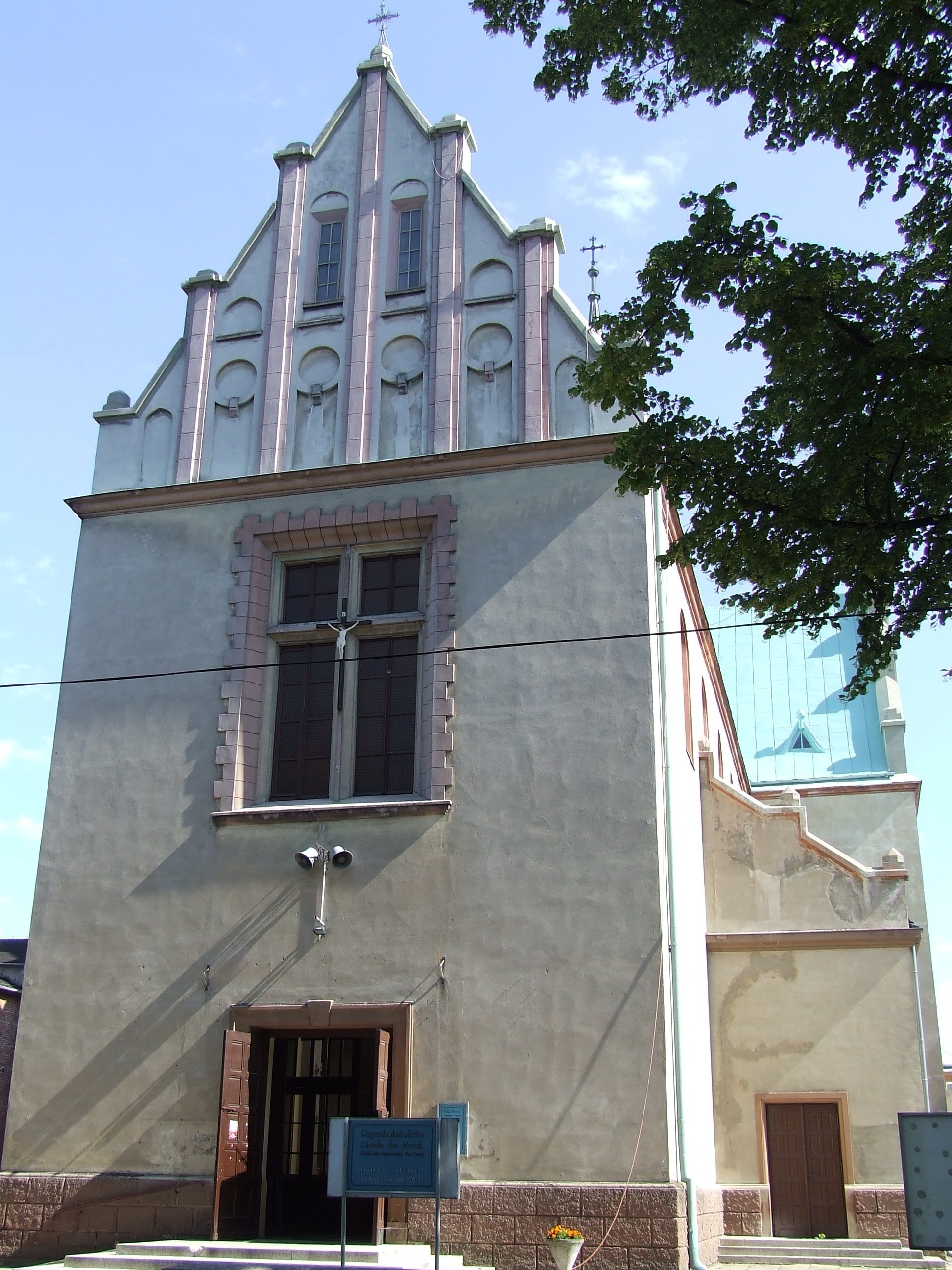 Kościół Św. Józefa w Łodzi-Rudzie Autor:Walther, 2006